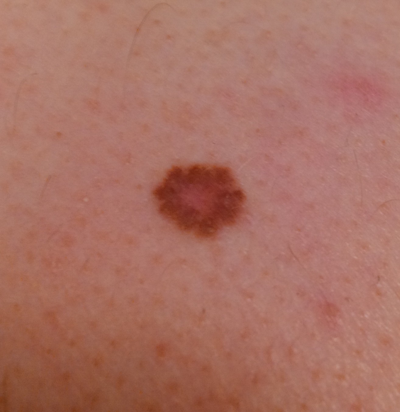 Mal unregelmäßige Farbe und keine Randschärfe